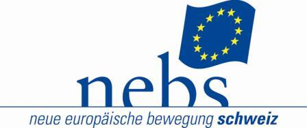 Logo Nebs - Neue Europäische Bewegung Schweiz